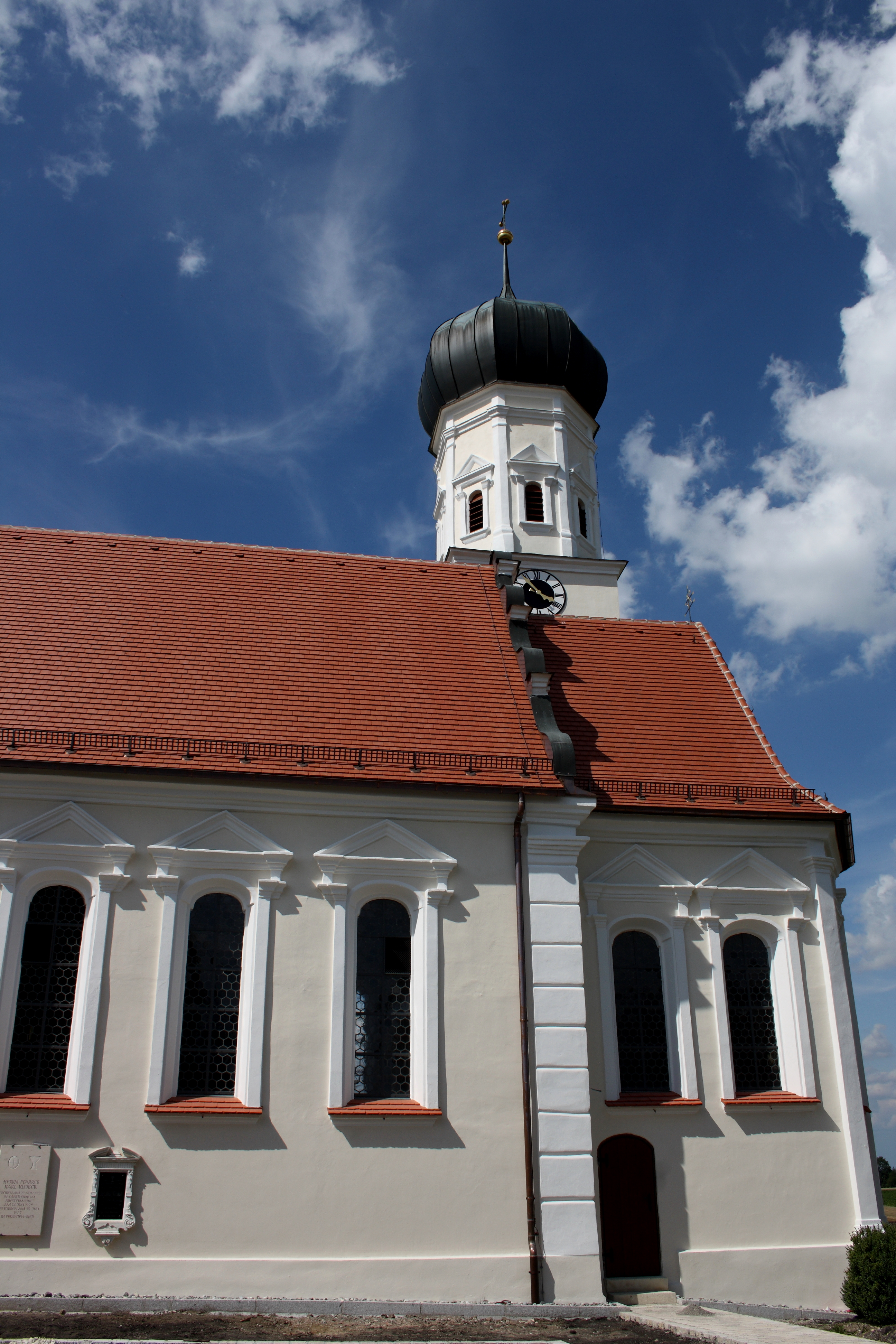 Katholische Pfarrkirche St. Nikolaus in Oberthürheim, einem Stadtteil von Buttenwiesen im Landkreis Dillingen an der Donau (Bayern)